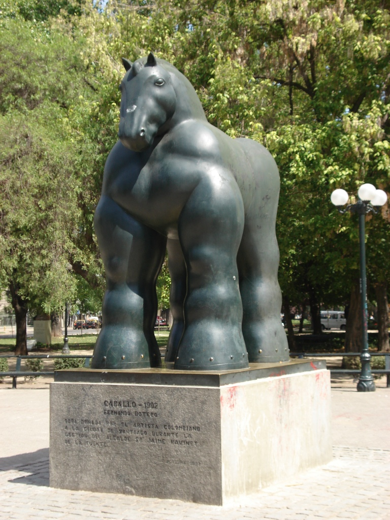 Vista de la escultura "Caballo" de Fernando Botero ubicada en el Parque Forestal de la ciudad de Santiago de Chile, frente al Museo de Arte Contemporáneo.